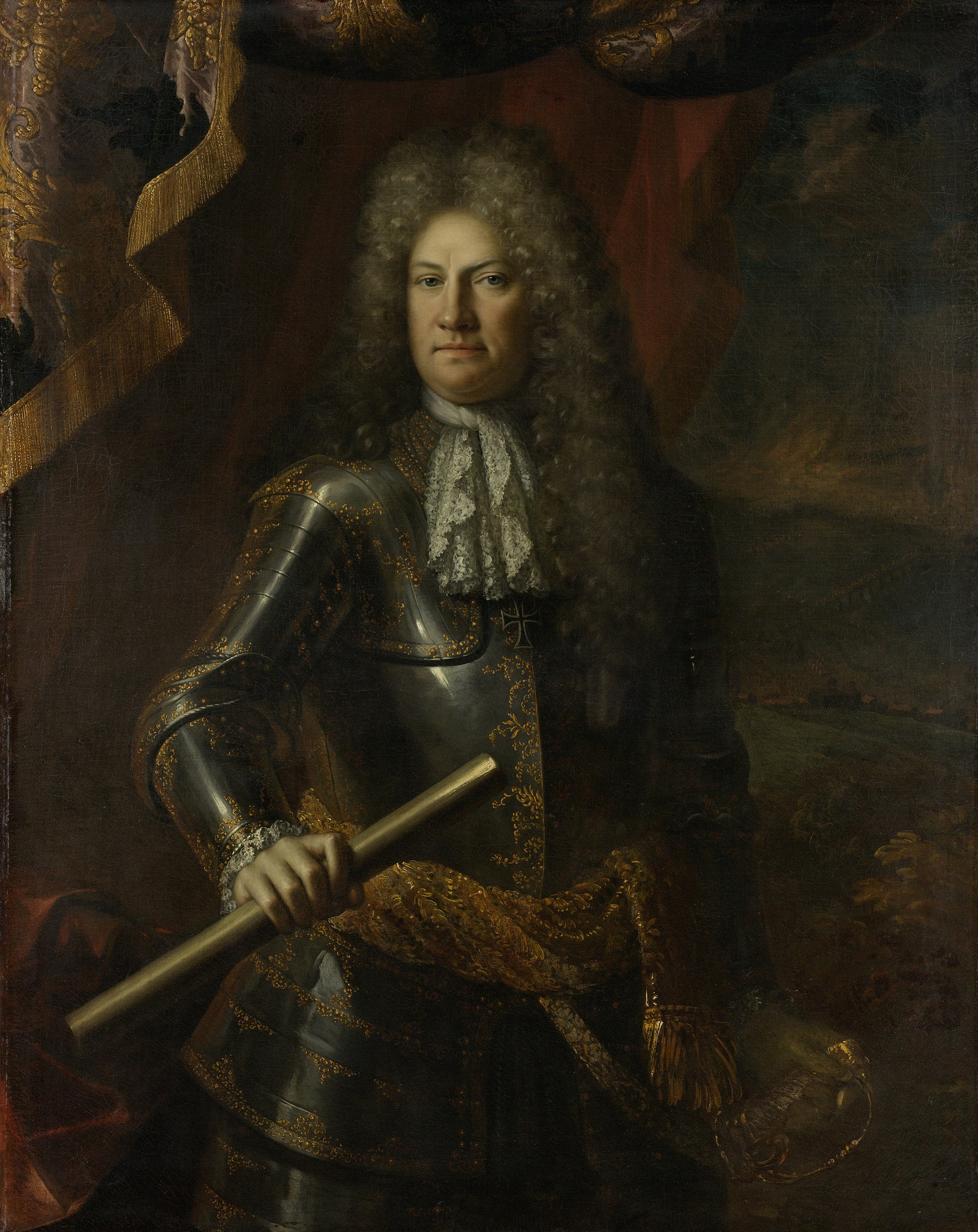 Portret van Godard van Reede (1644-1703), heer van Amerongen, luitenant-generaal. Heupstuk, staande in wapenrusting, commadostaf in de rechterhand, de linkerhand op het gevest van zijn sabel. Rechts op de achtergrond de slag aan de Boyne (1690).